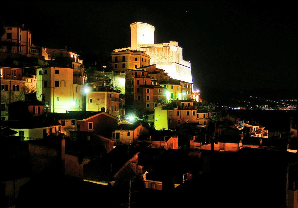 Il castello di Lerici, Liguria, Italia